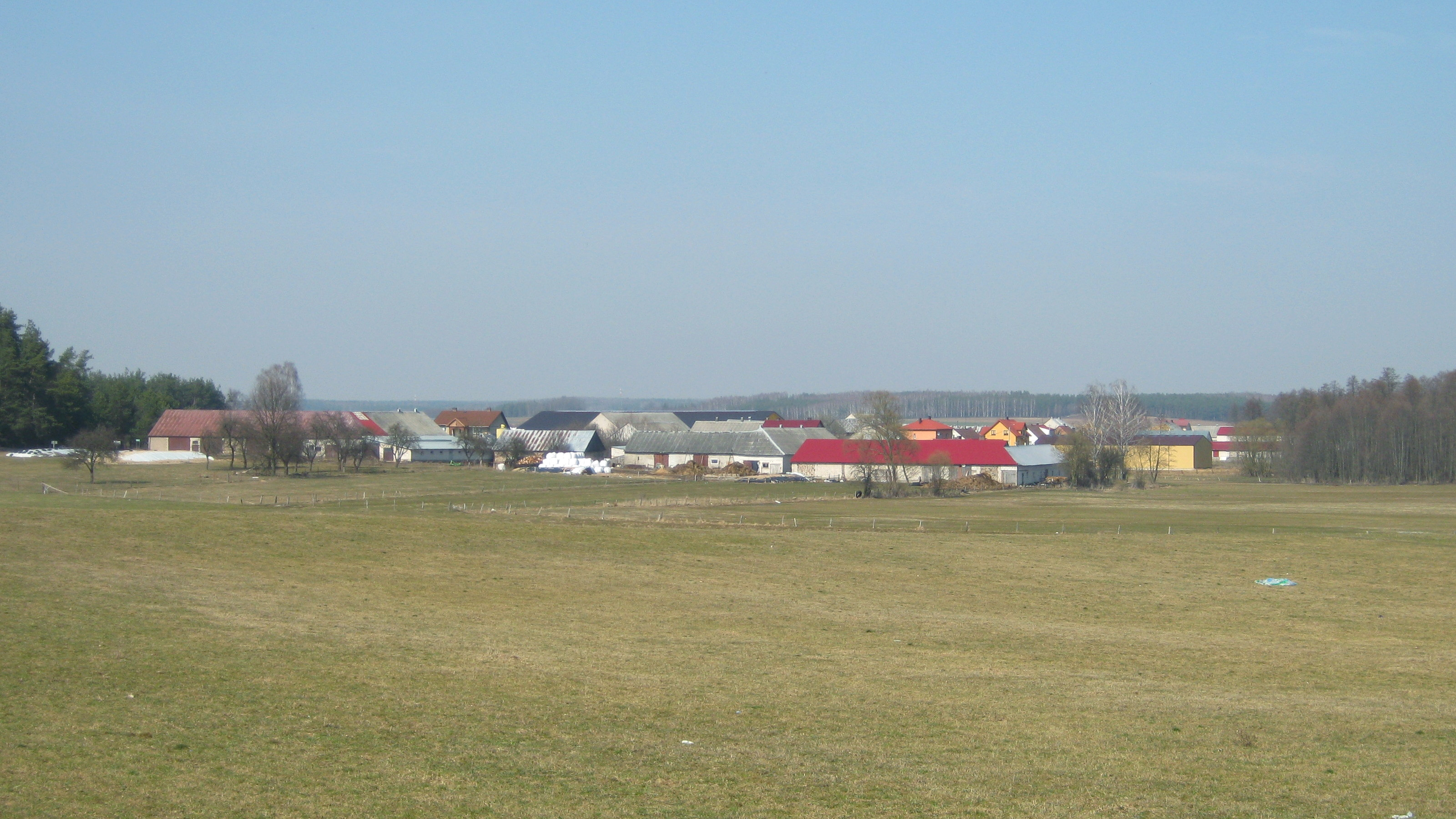 wieś Kiełcze-Kopki - powiat kolneński